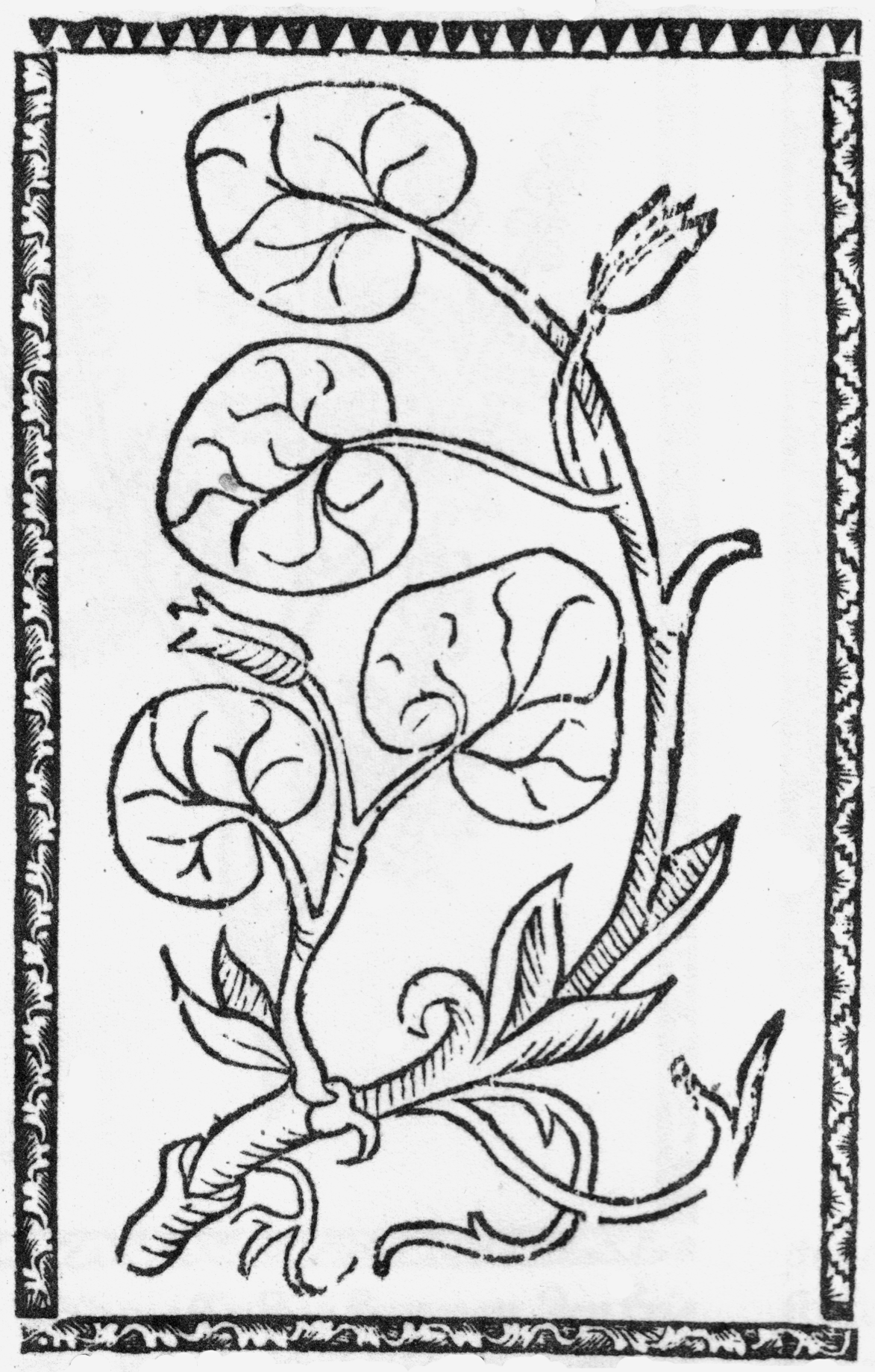 Abbildung der Haselwurz